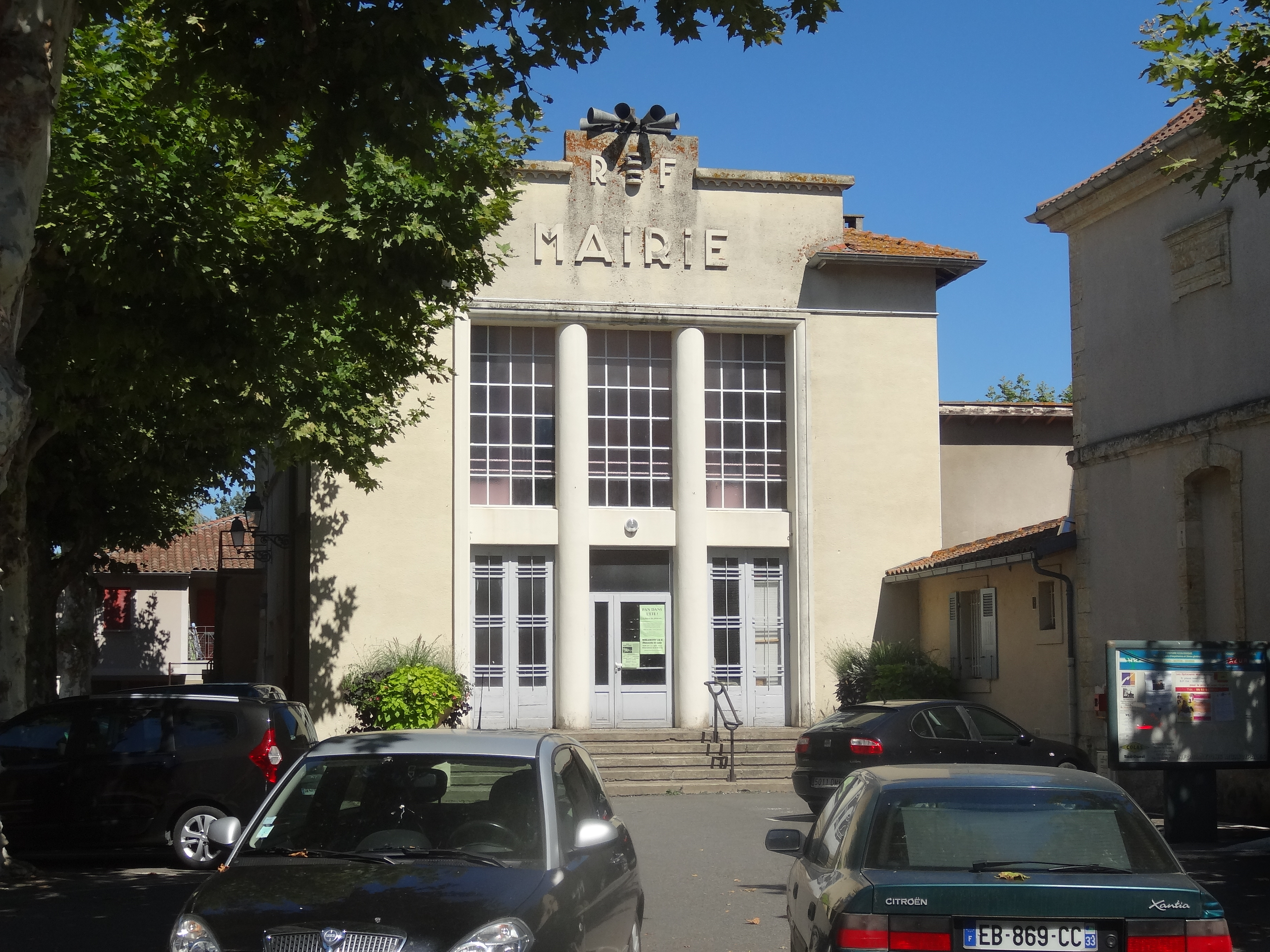 Ancienne mairie surmontée d'une sirène.